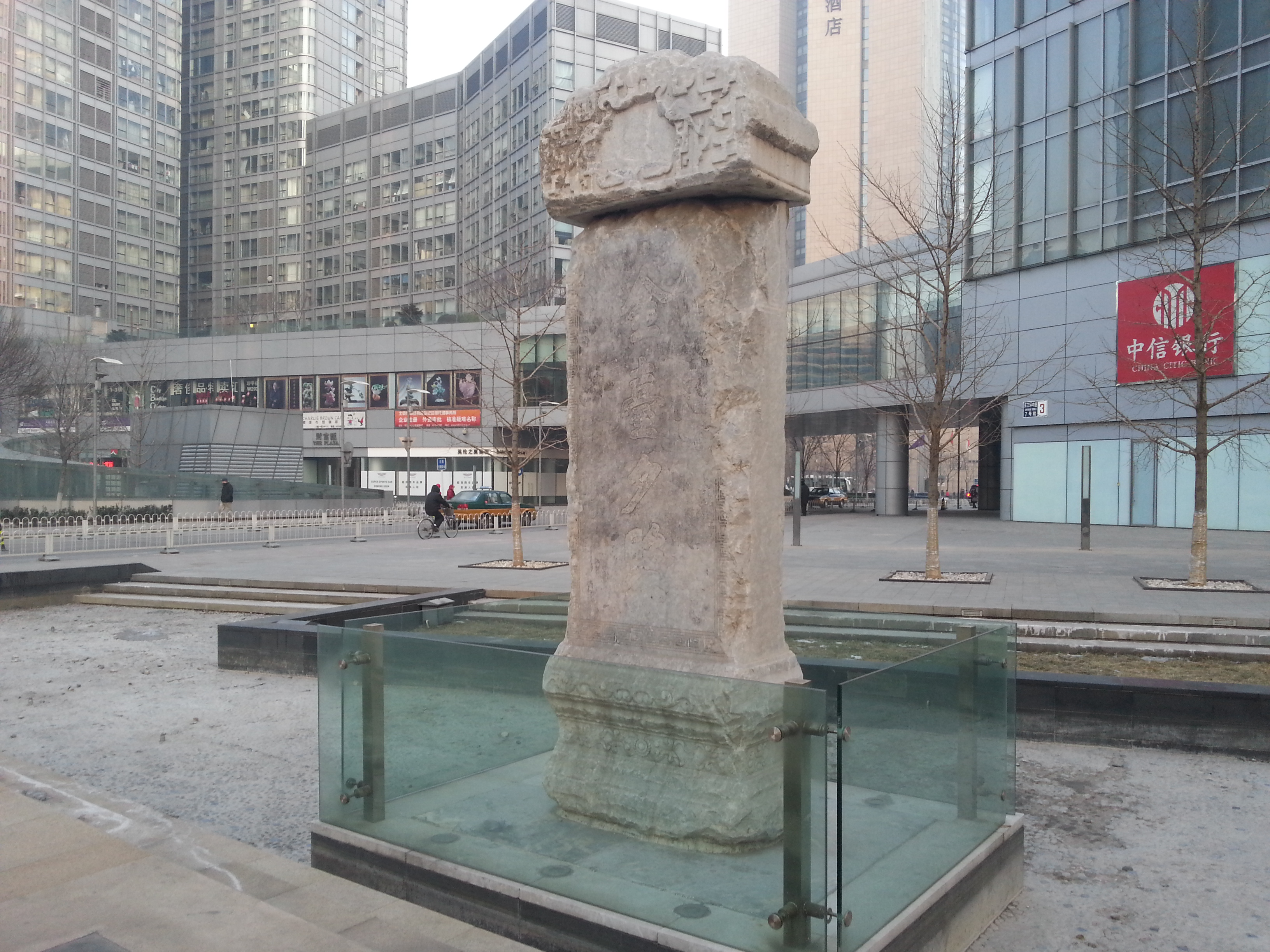 金台夕照石碑，北京市朝阳区金台夕照地铁站西